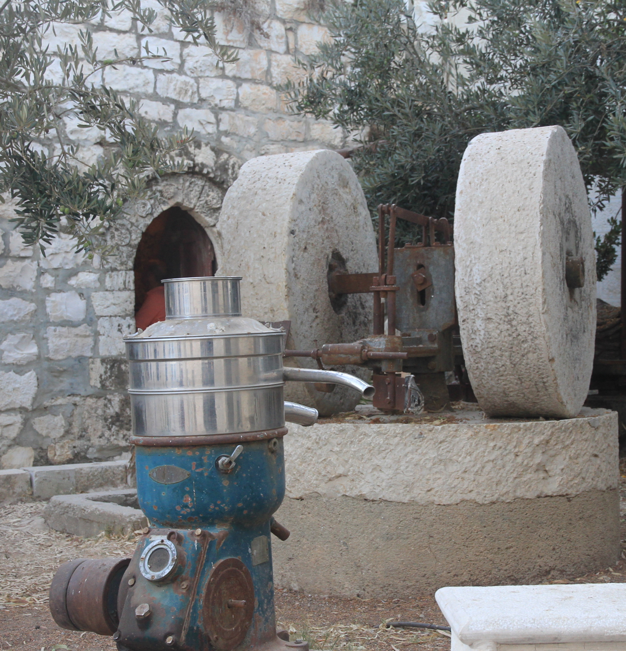 Taybeh, Palästina.